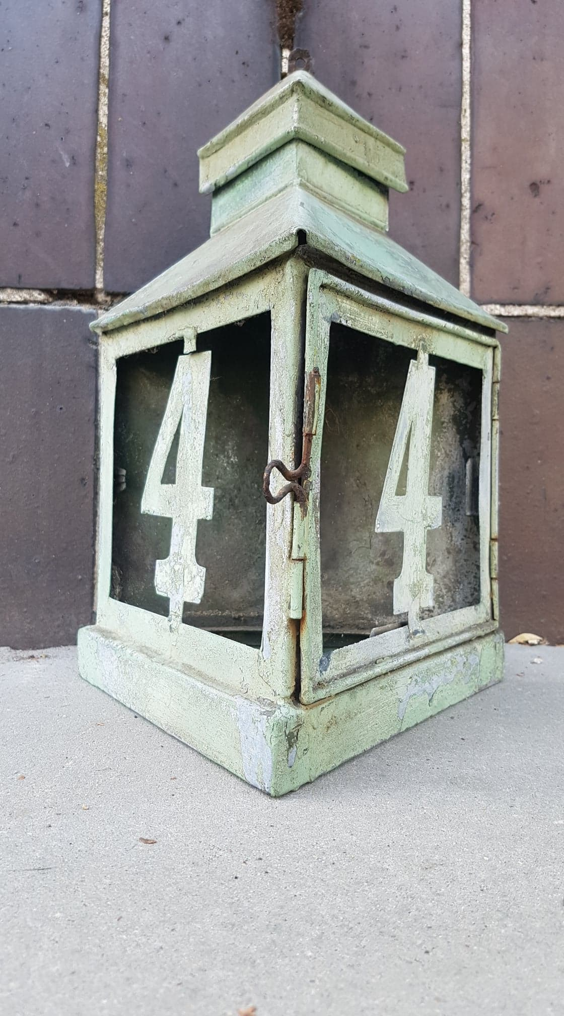 Blaszany numerek domu podświetlany żarówką. Przedwojenne regulacje obligowały właścicielu domów na poznańskim osiedlu Abisynia/Kasztelanów do ich instalowania.